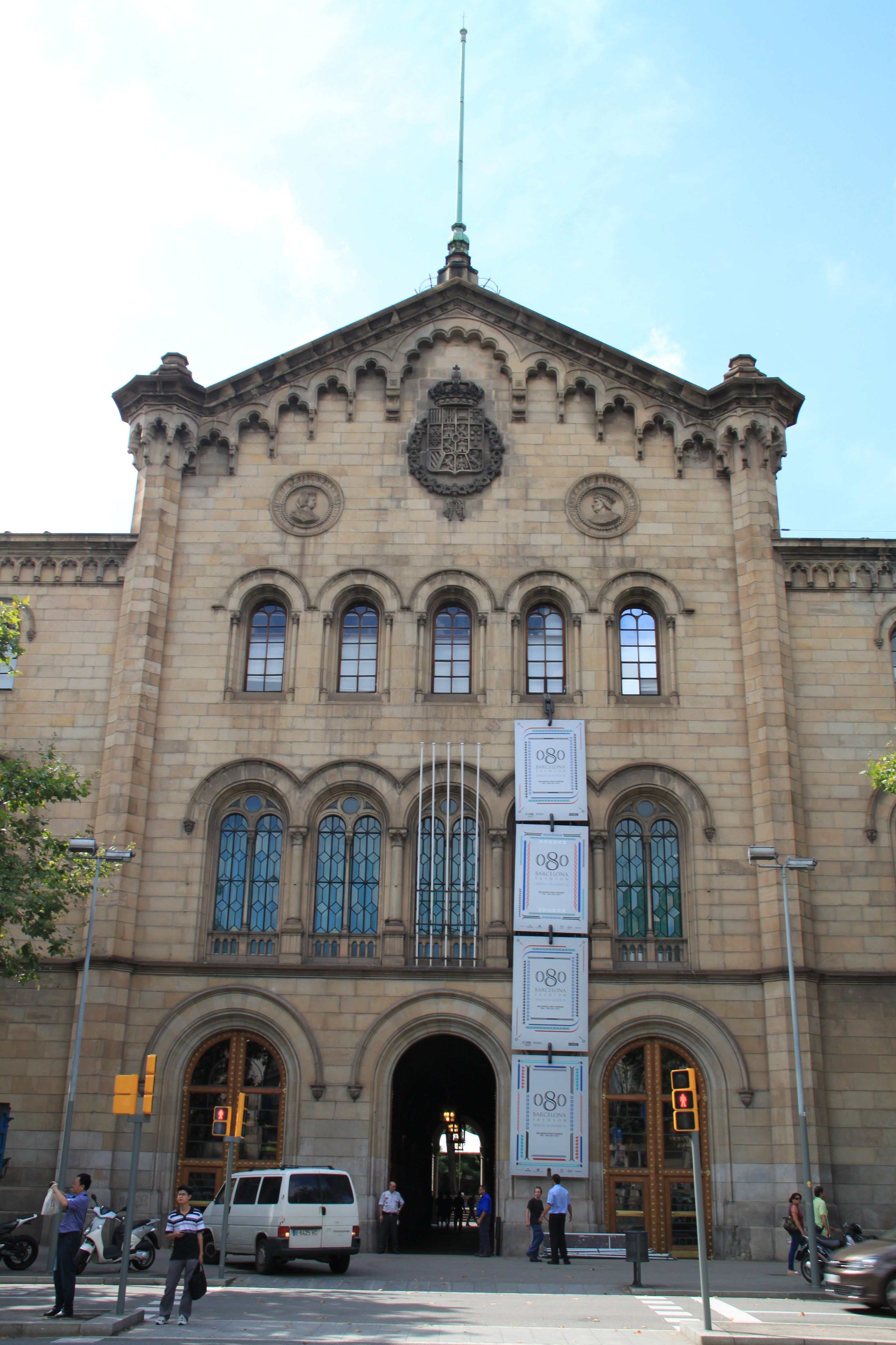 Façade de l'université de Barcelone